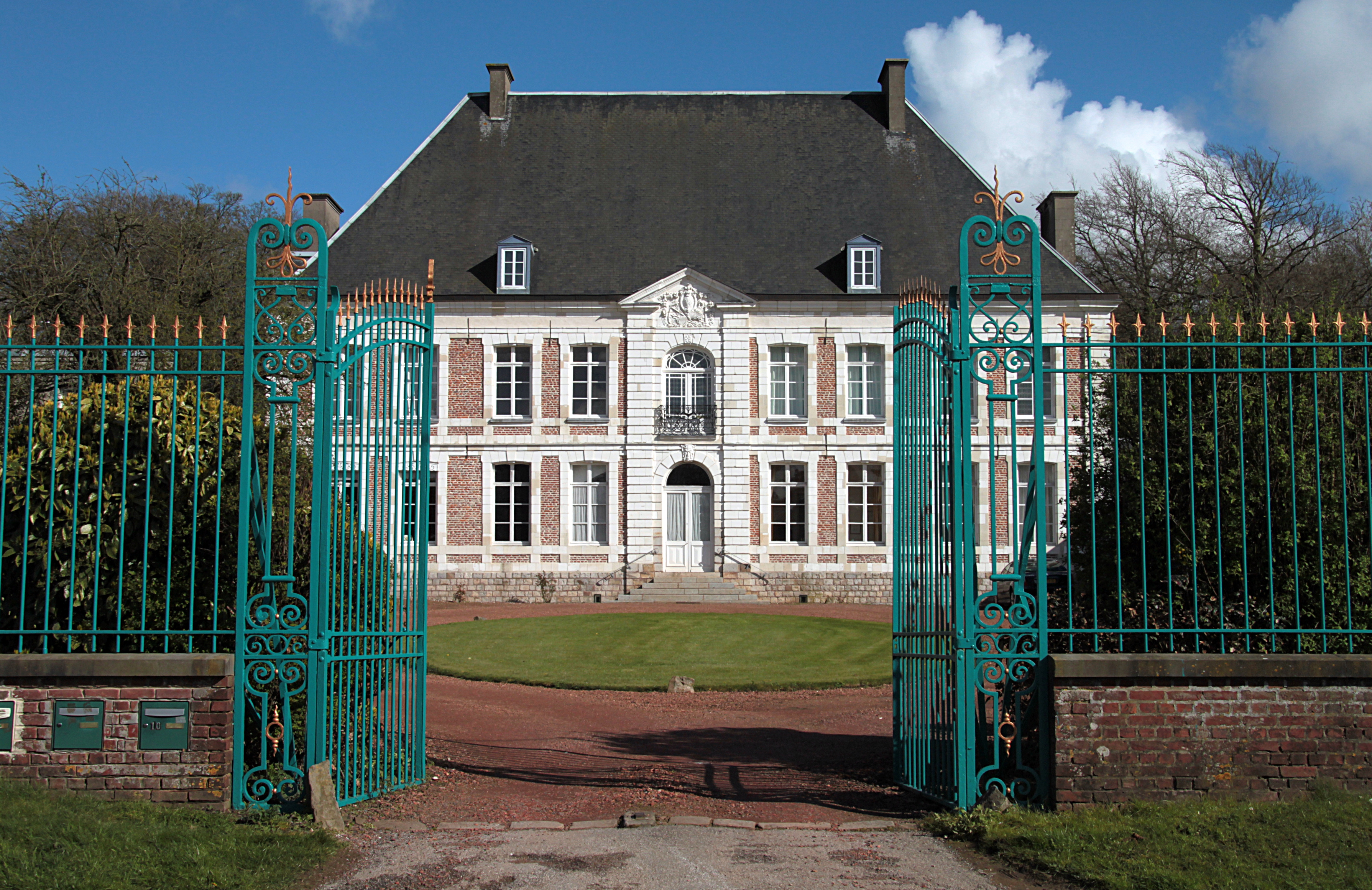 construction du XIXe récemment restaurée.